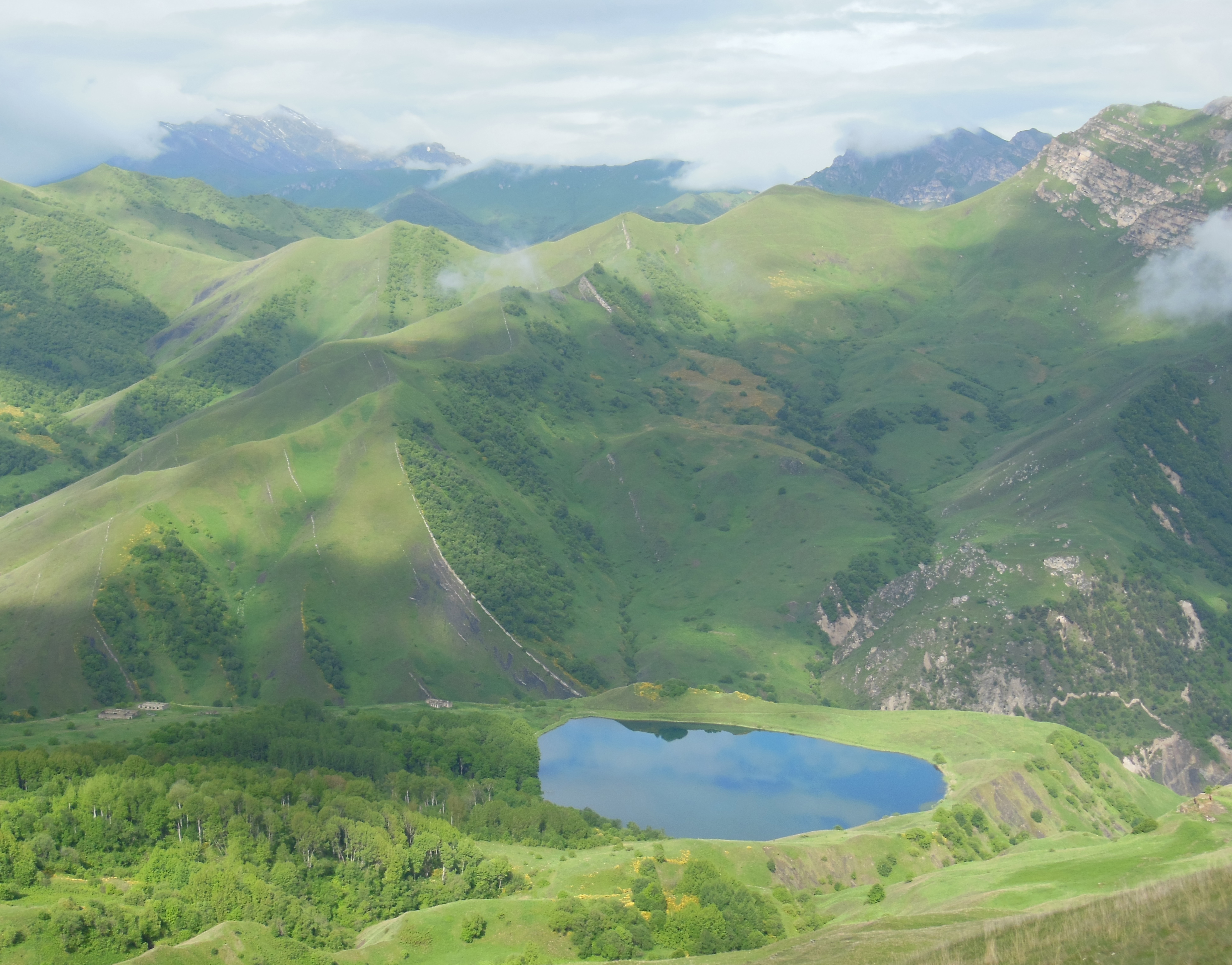 оз. Галанчож (чеч. Галайн-Іам) — озеро в Галанчожском районе Чеченской республики.